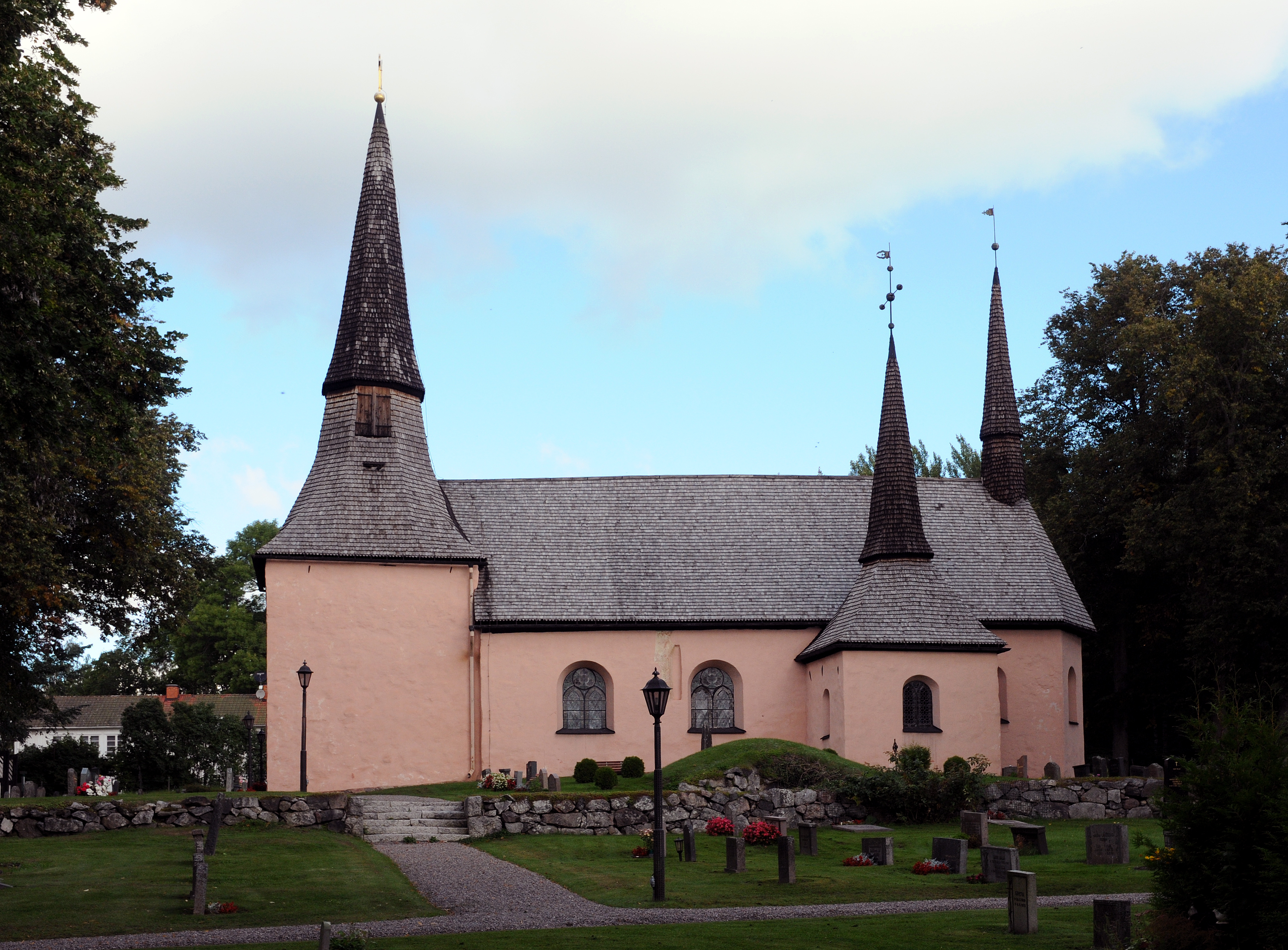 Ripsa kyrka i Nyköpings kommun